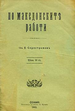 Корица на "По македонските работи" на Евтим Спространов.